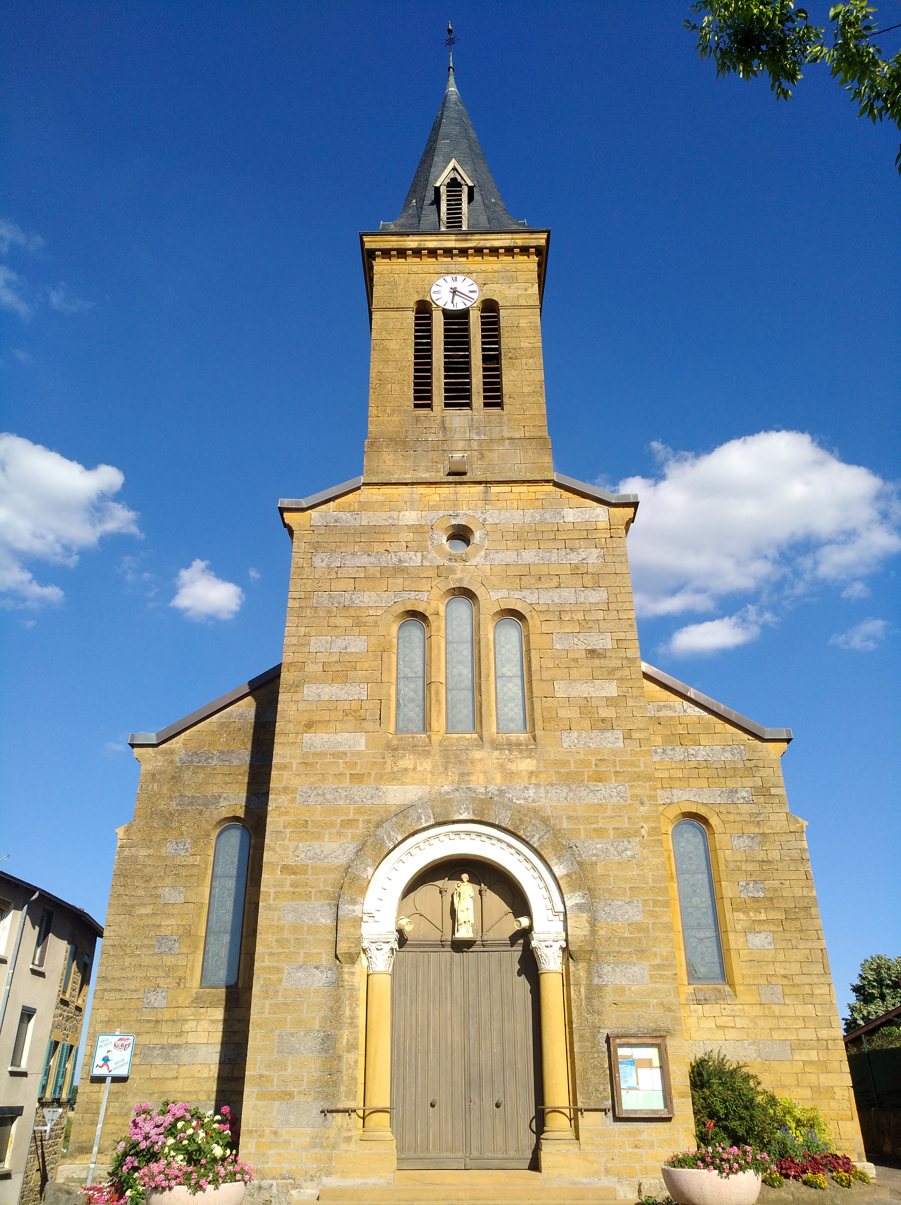 Église Saint-Philibert des Olmes (Rhône, France).